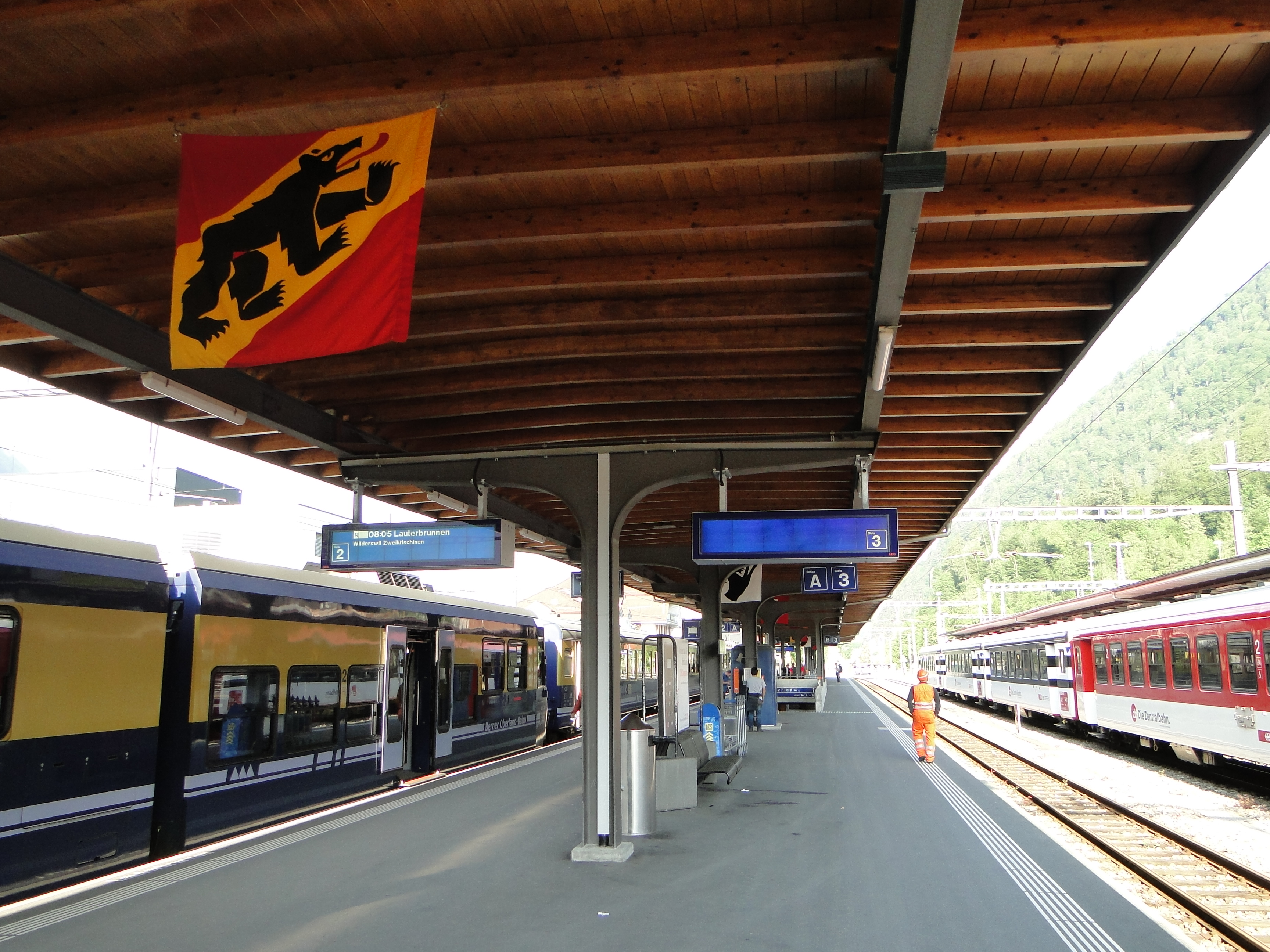 Interlaken